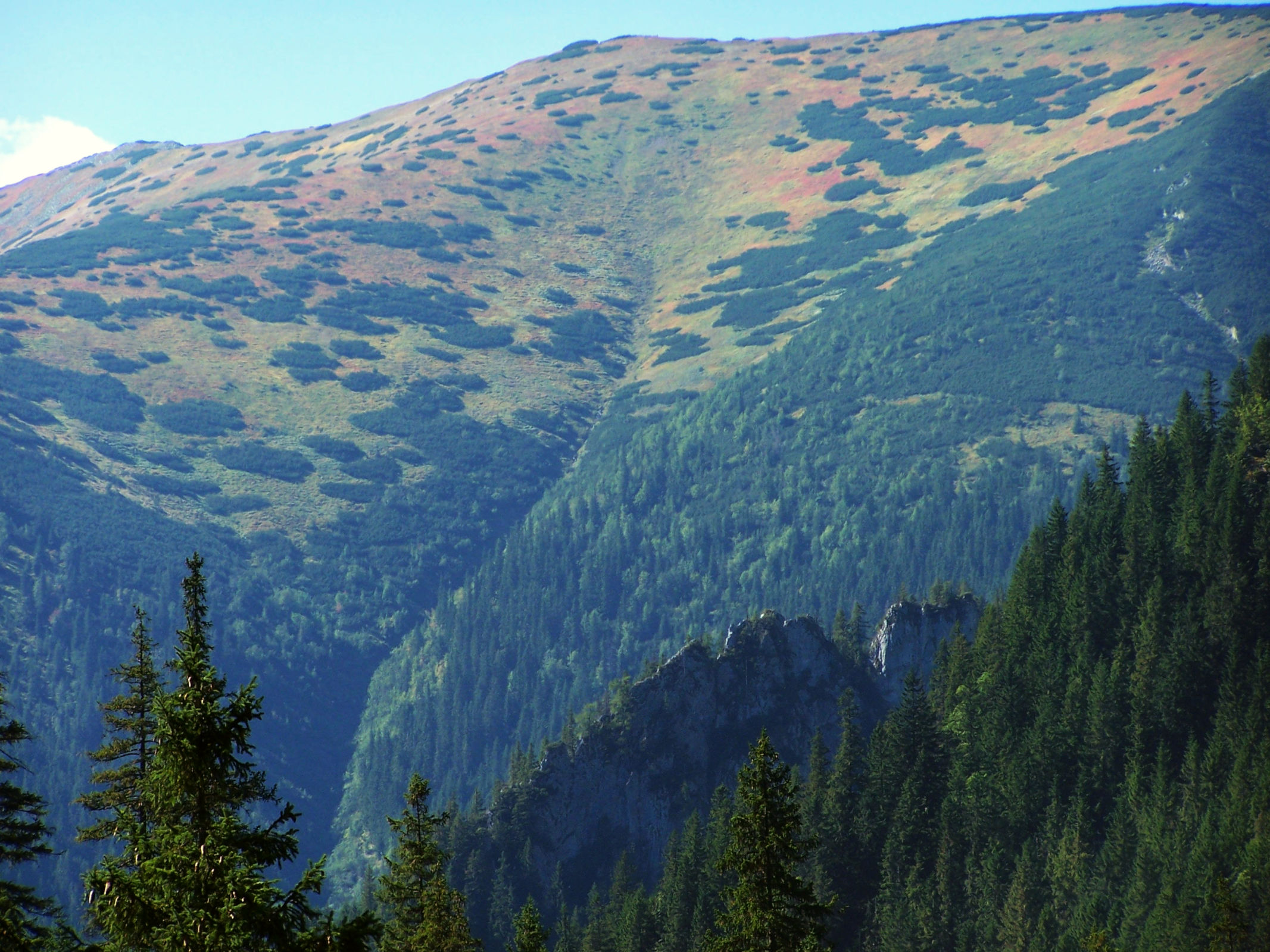 Żleb pod Banie (Tatra Mountains, Ornak) (Nazwa pliku jest błędna !)